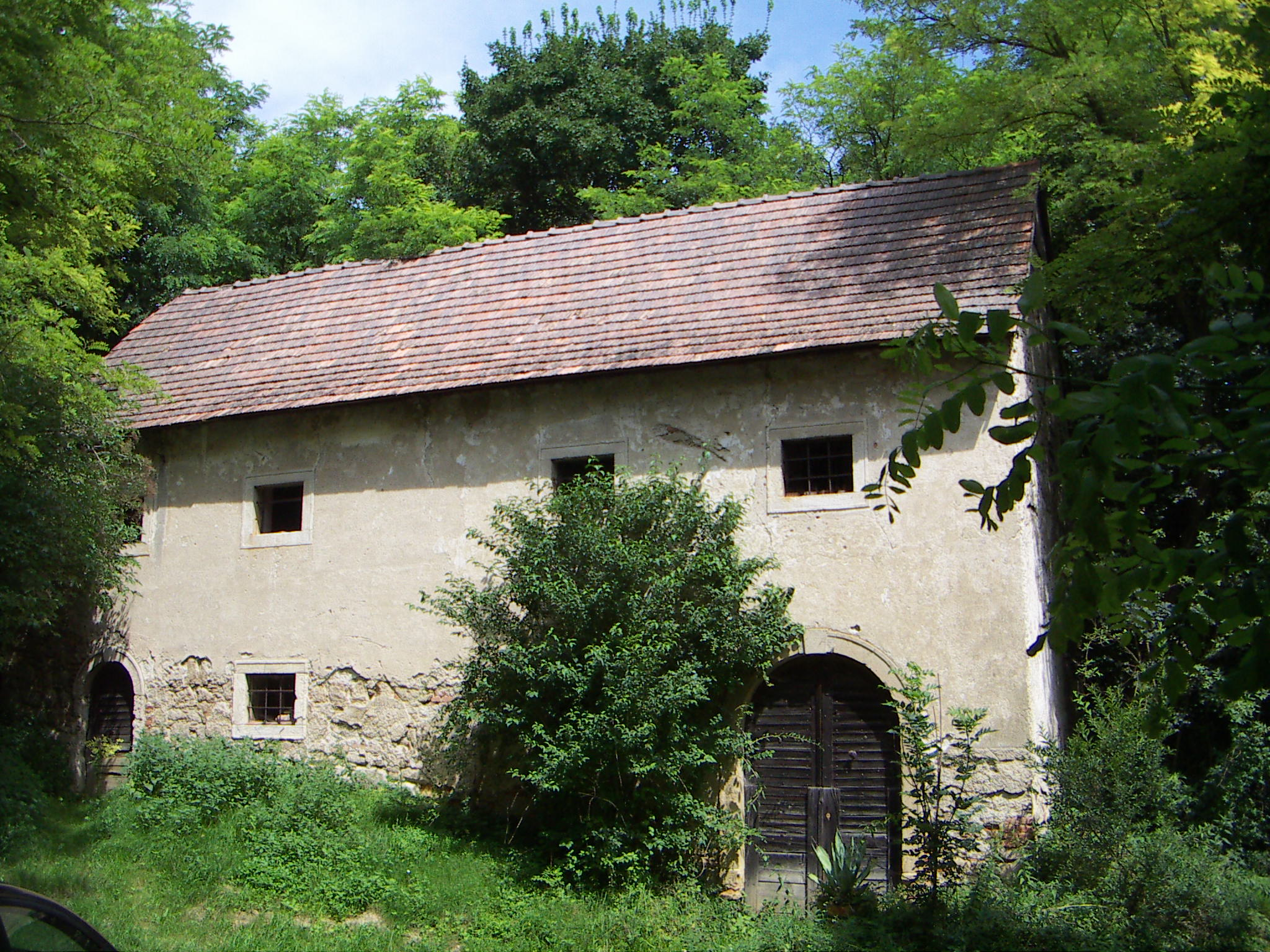 Pfarrkirche Herrnleis, ehemaliger Schüttkasten der Pfarre Herrnleis am südlichen Ende der Kellergasse